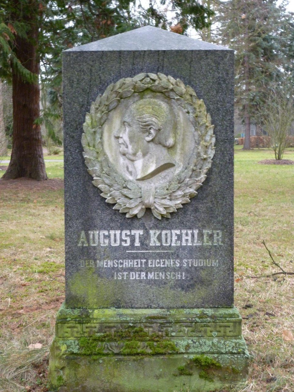 Grabstätte von August Köhler